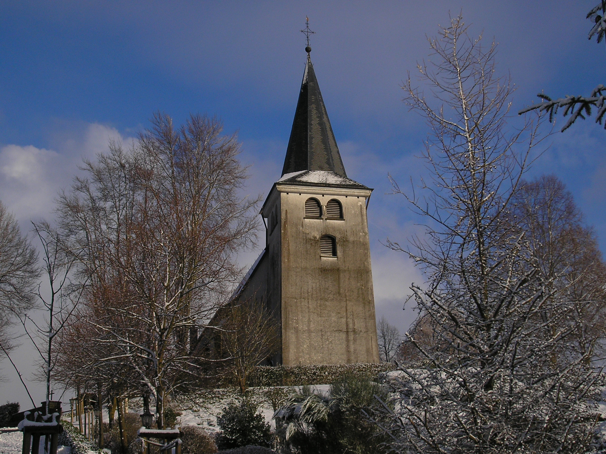 Kirche in Wirtzfeld